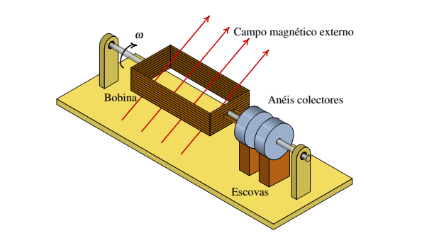 Gerador tensão alterna